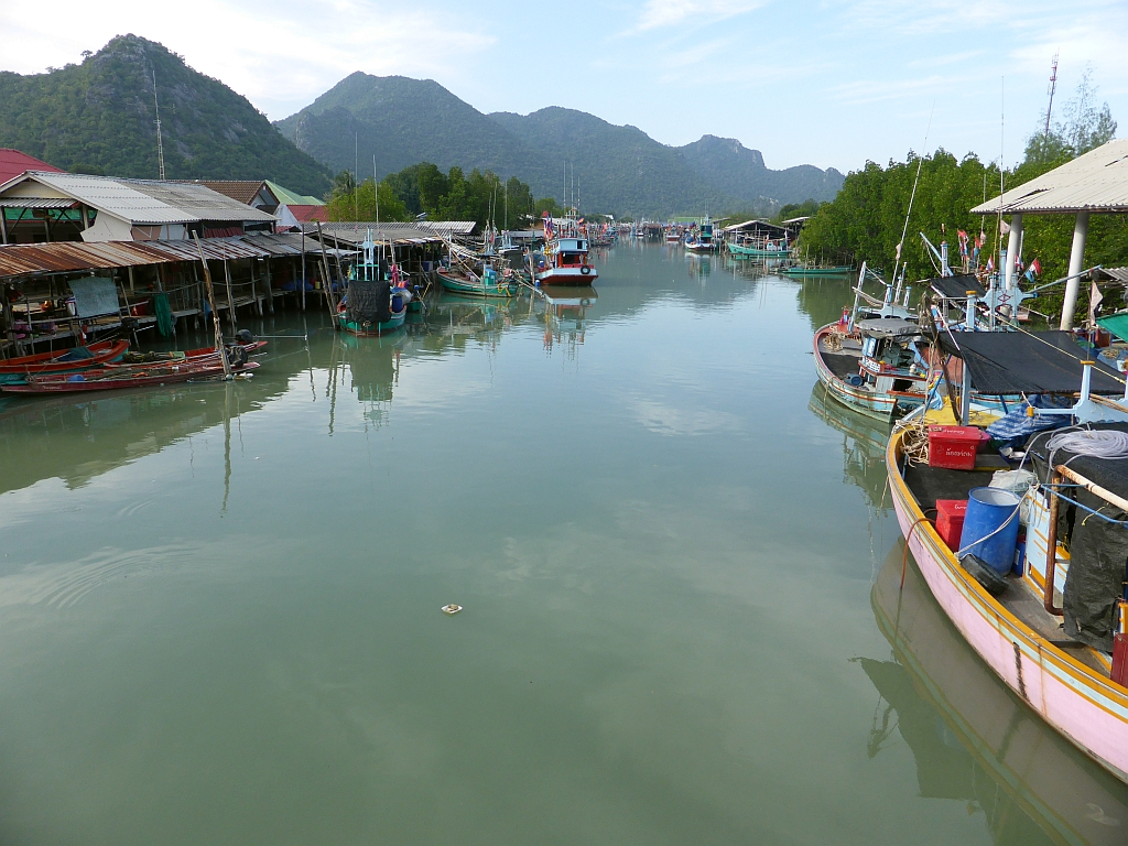 Phraya-Nakhon-Höhle, 4.11.2015